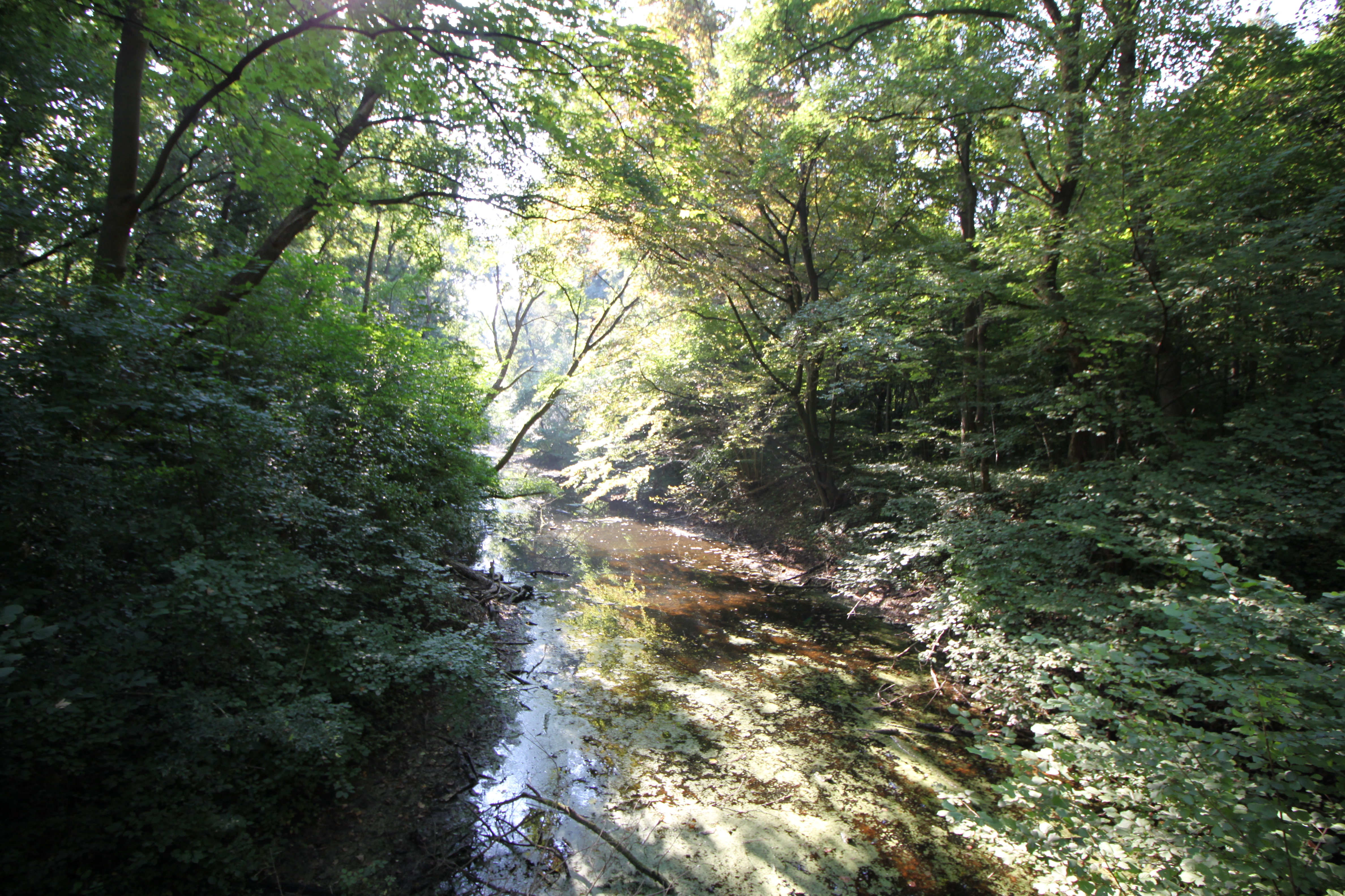 Fadenbach-Brücke aus Holz in Orth an der Donau, Weiterfluss